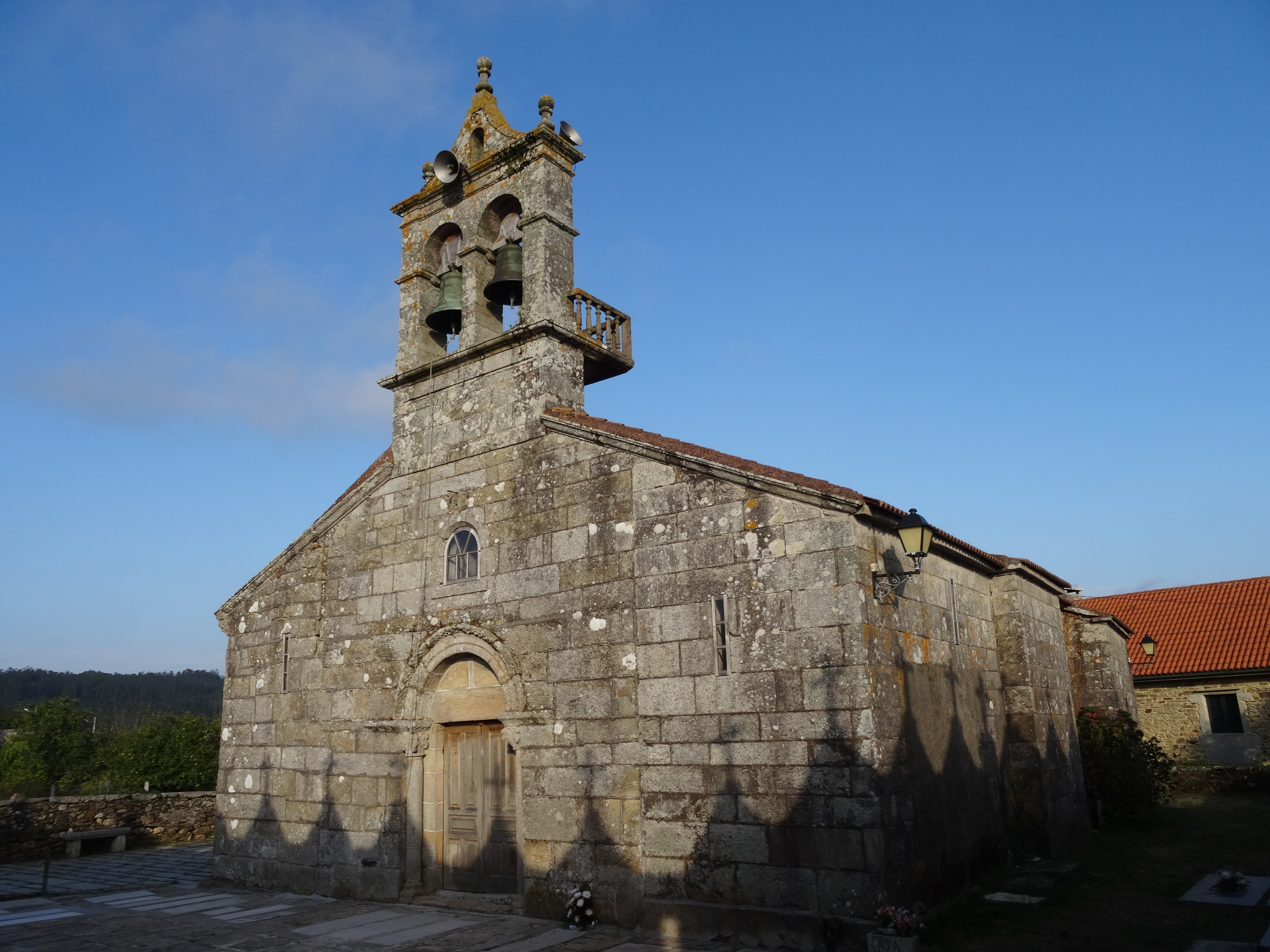 Ver título.